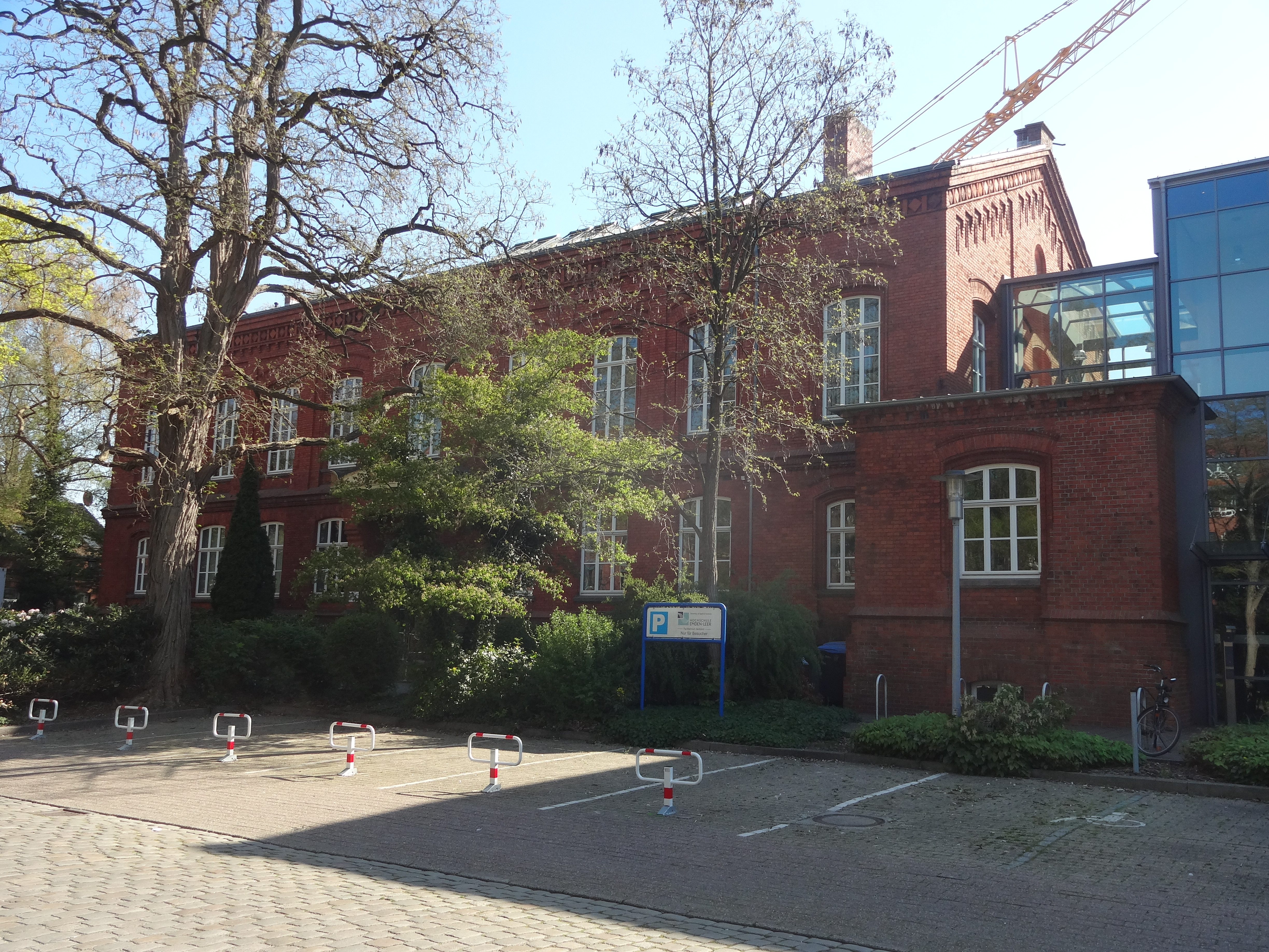 denkmalgeschützte Seefahrtschule in der Bergmannstraße 35 in Leer (Ostfriesland)